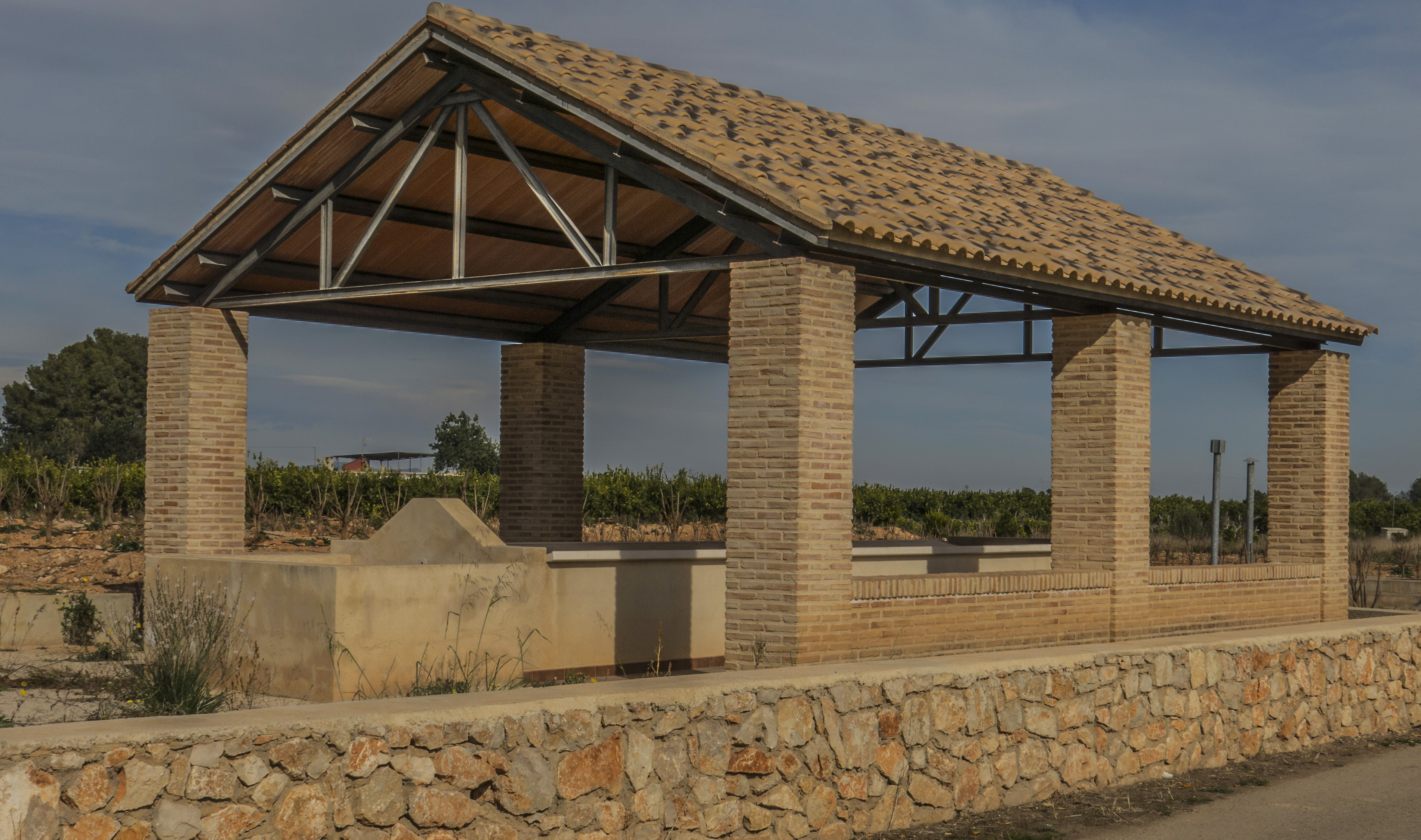 Nou llavador situat a la Garrofera (terme d'Alzira)